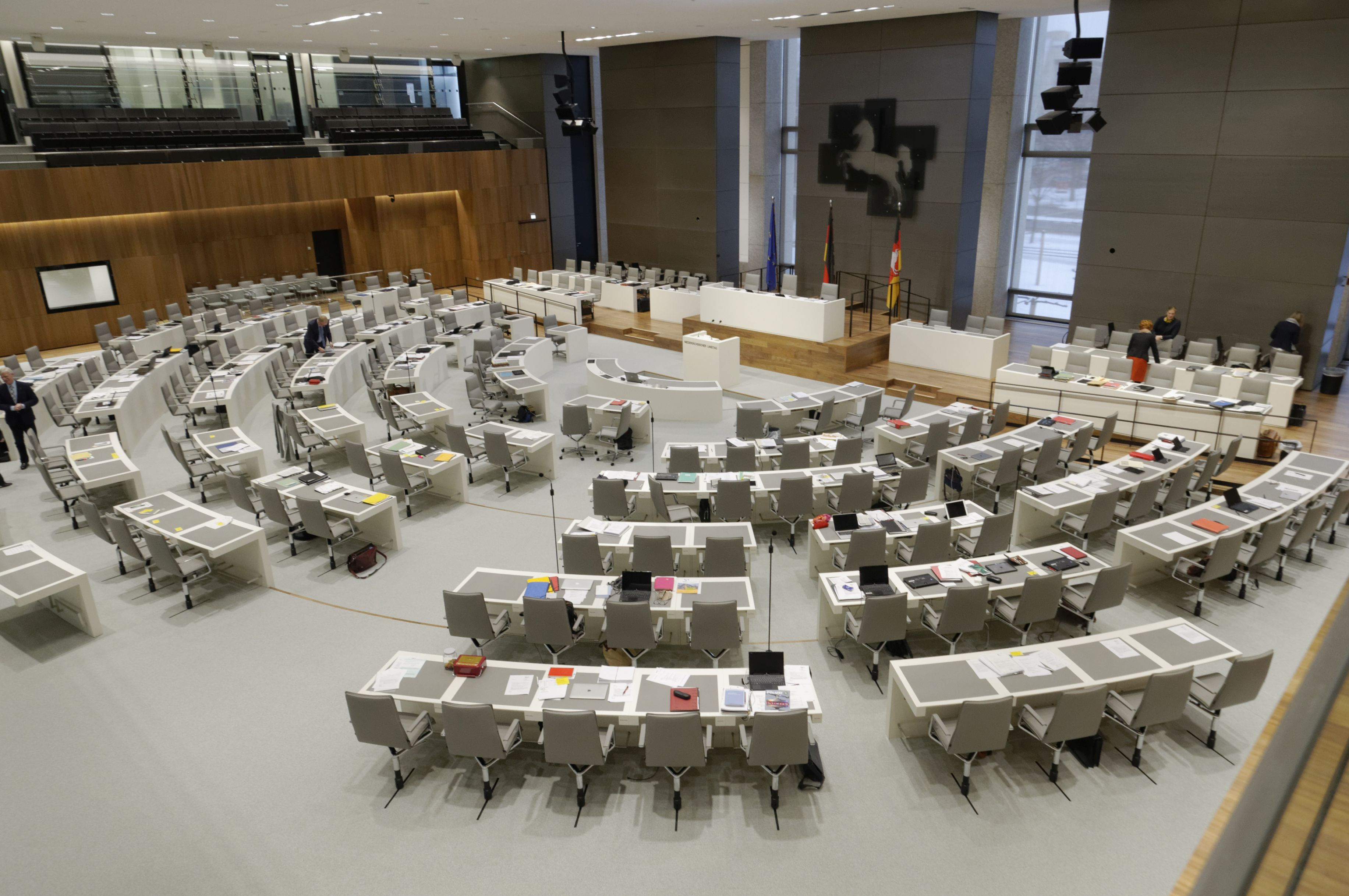 der neue Niedersächsischer Landtag 2018